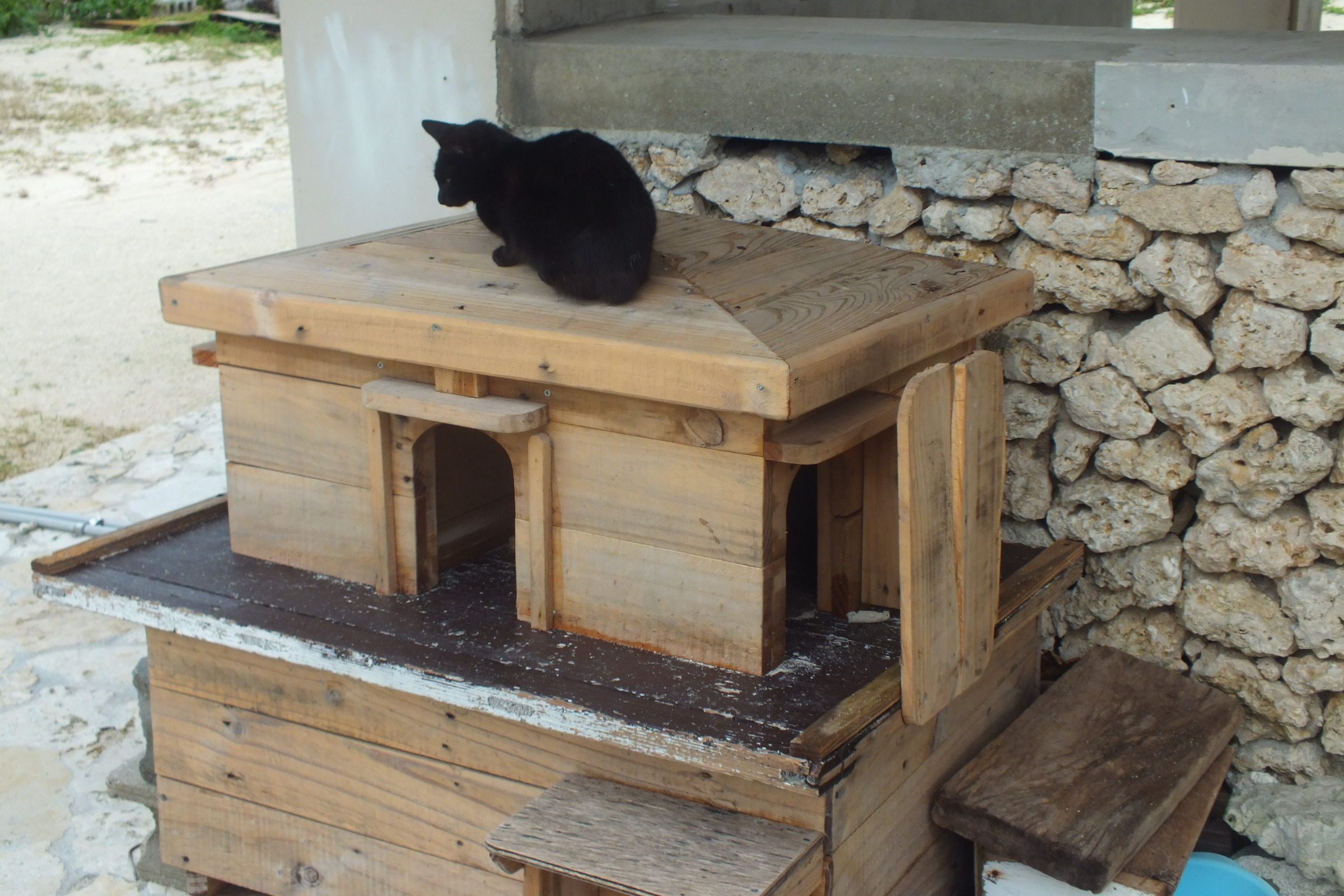 2016-02-27 Kondoi Beach Taketomi-Island,Okinawa コンドイ浜（沖縄県八重山郡竹富町竹富）の猫小屋